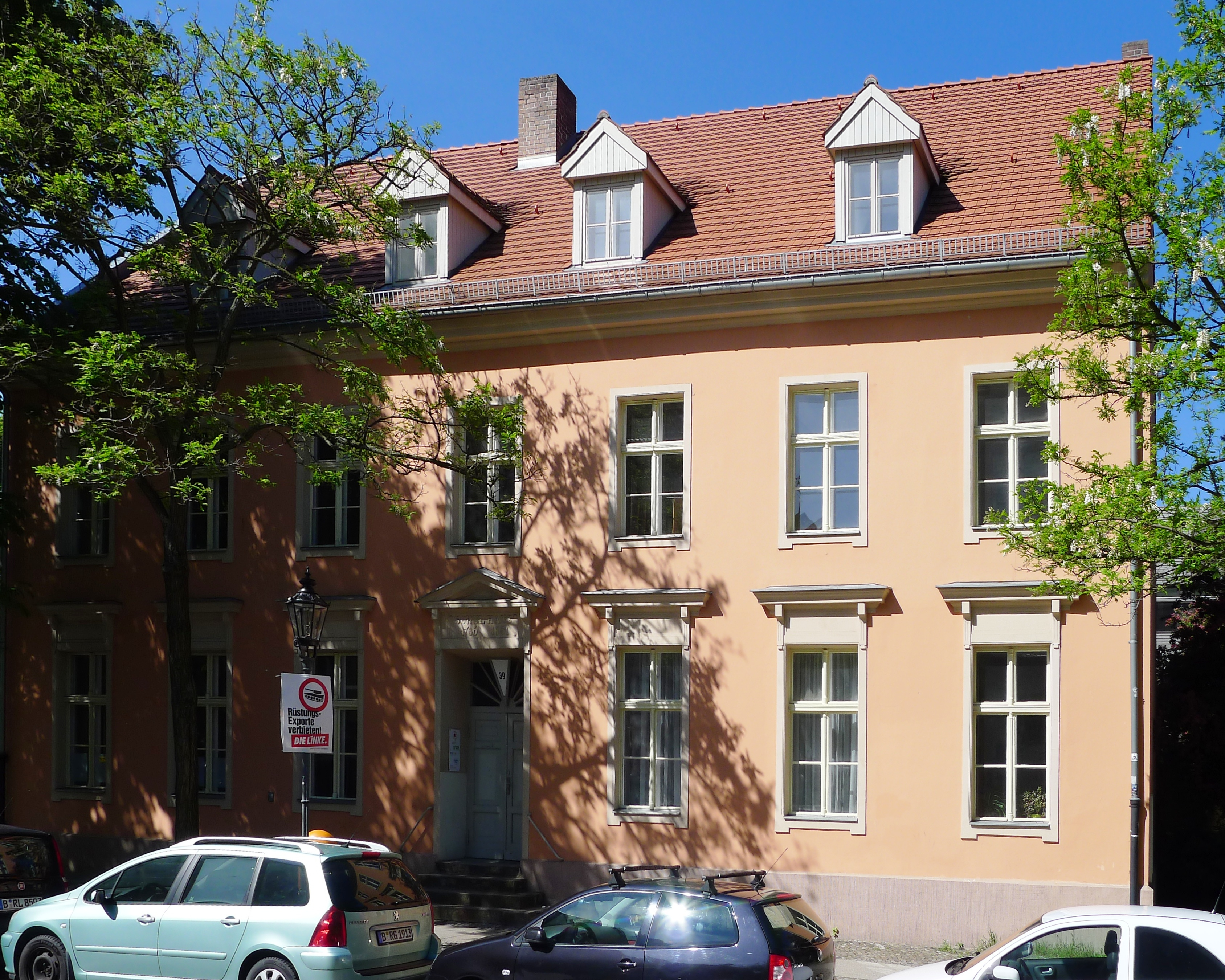 ehemaliges Schulhaus